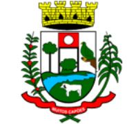 Brasão Oficial de Muitos Capões - RS - Brasil.